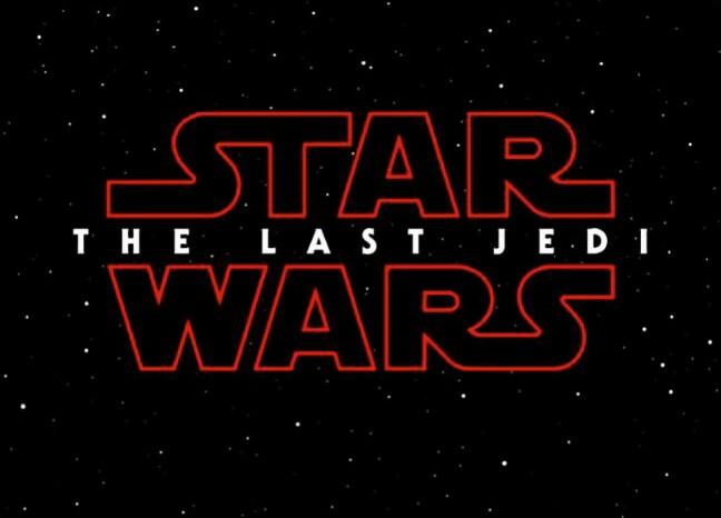 Logo oficial de la película Episodio VIII The Last Jedi de Star Wars